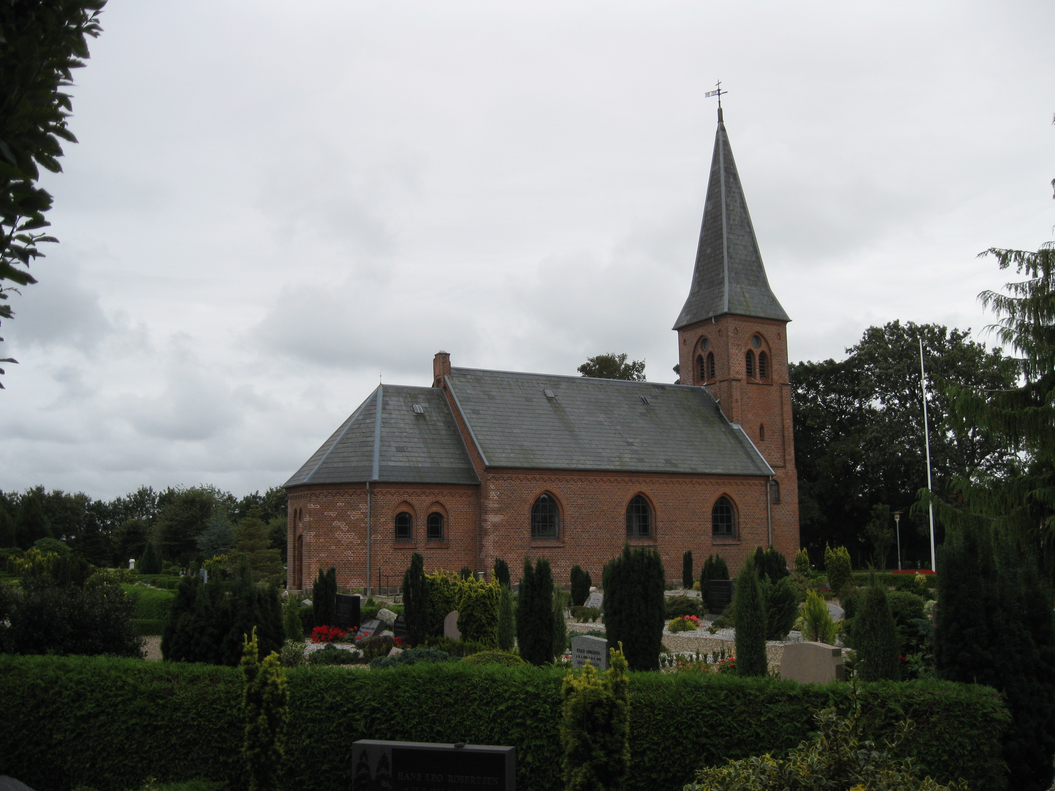 Troldhede Kirke